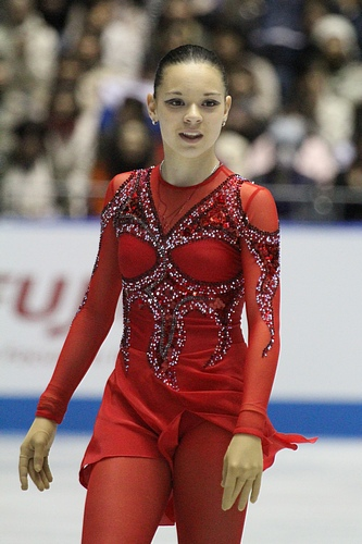 Аделина Сотникова (Россия) на командном чемпионате мира по фигурному катанию 2012